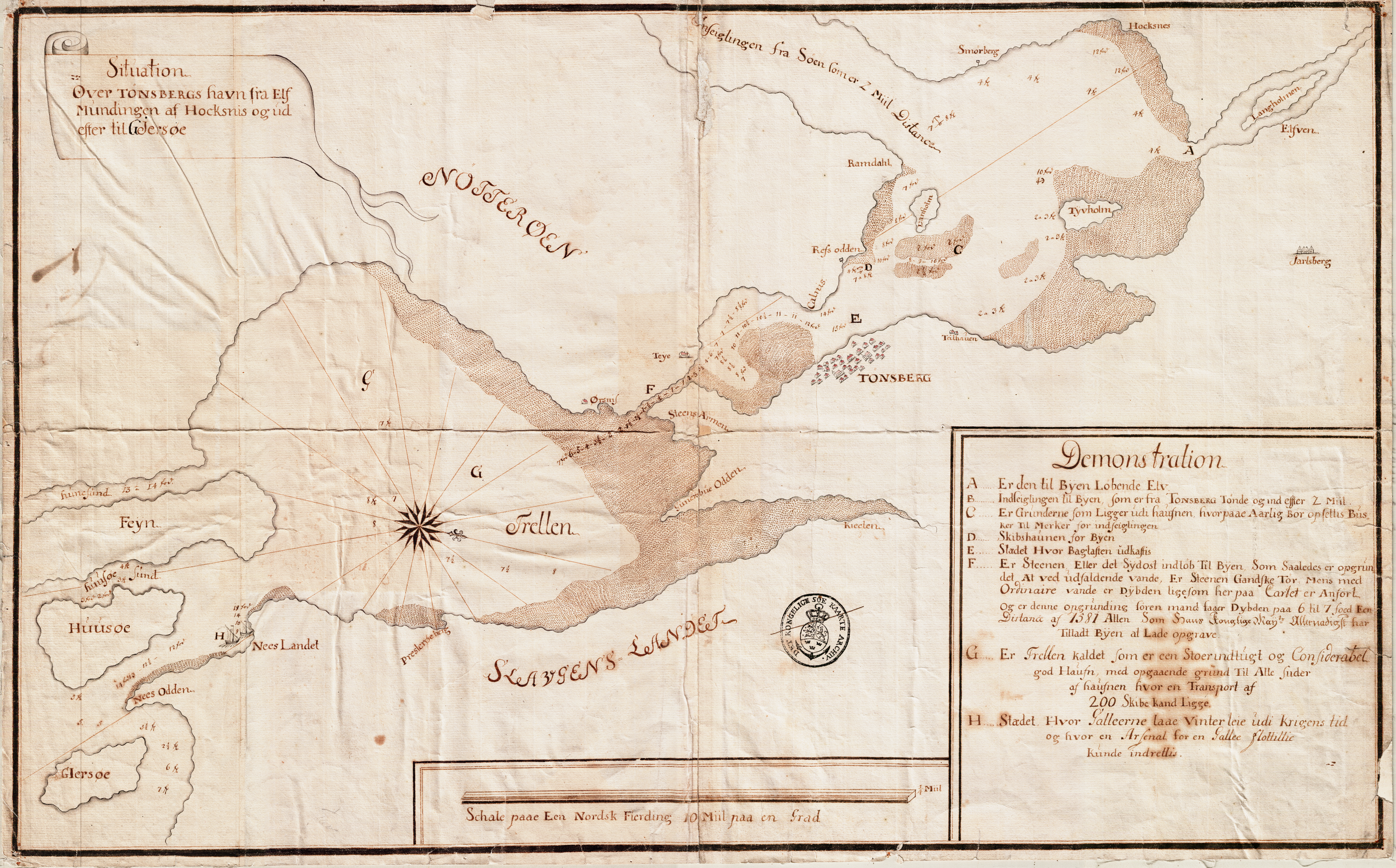 Sjøkart over Tønsberg havn fra ukjent årstall. Håndtegnet i omtrentlig målestokk 1:8000. Original kartstørrelse ca 70 x 43 cm. Et eksemplar befinner seg hos Statens kartverk Sjø i Stavanger. Trolig fra ca. 1730 ifølge Søkbar digitalkopi av Beskrivende Katalog over den kulturhistoriske Udstillings Afdeling for Tønsberg og Omegn (kartdatering side 3